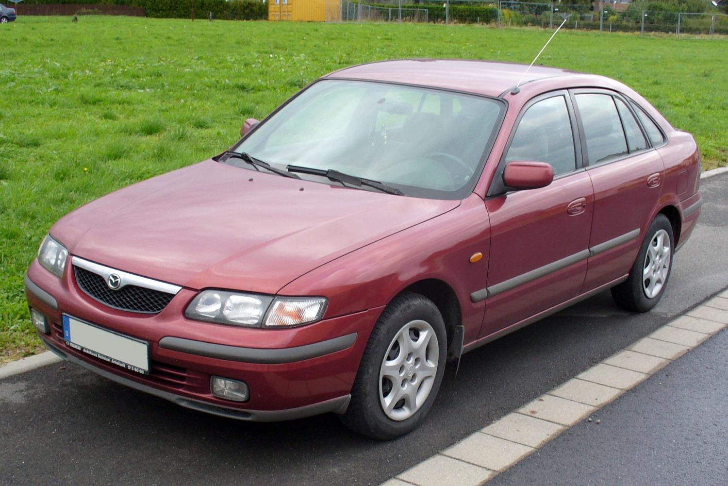 Mazda 626 pre-facelift